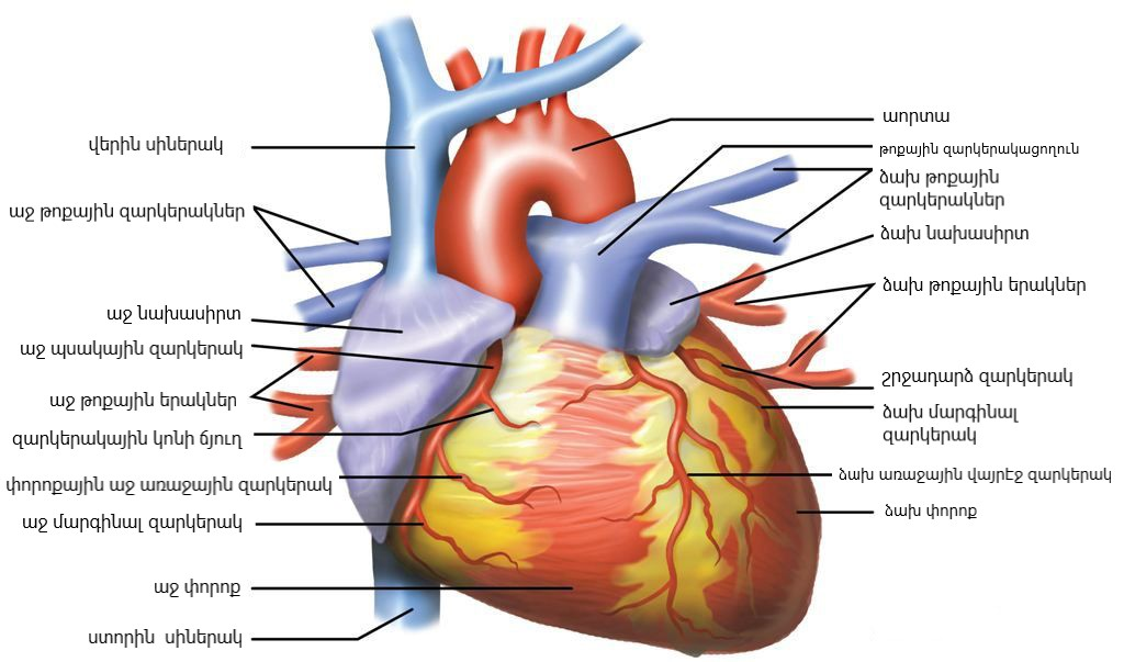 Մարդու սրտի կառուցվածքը